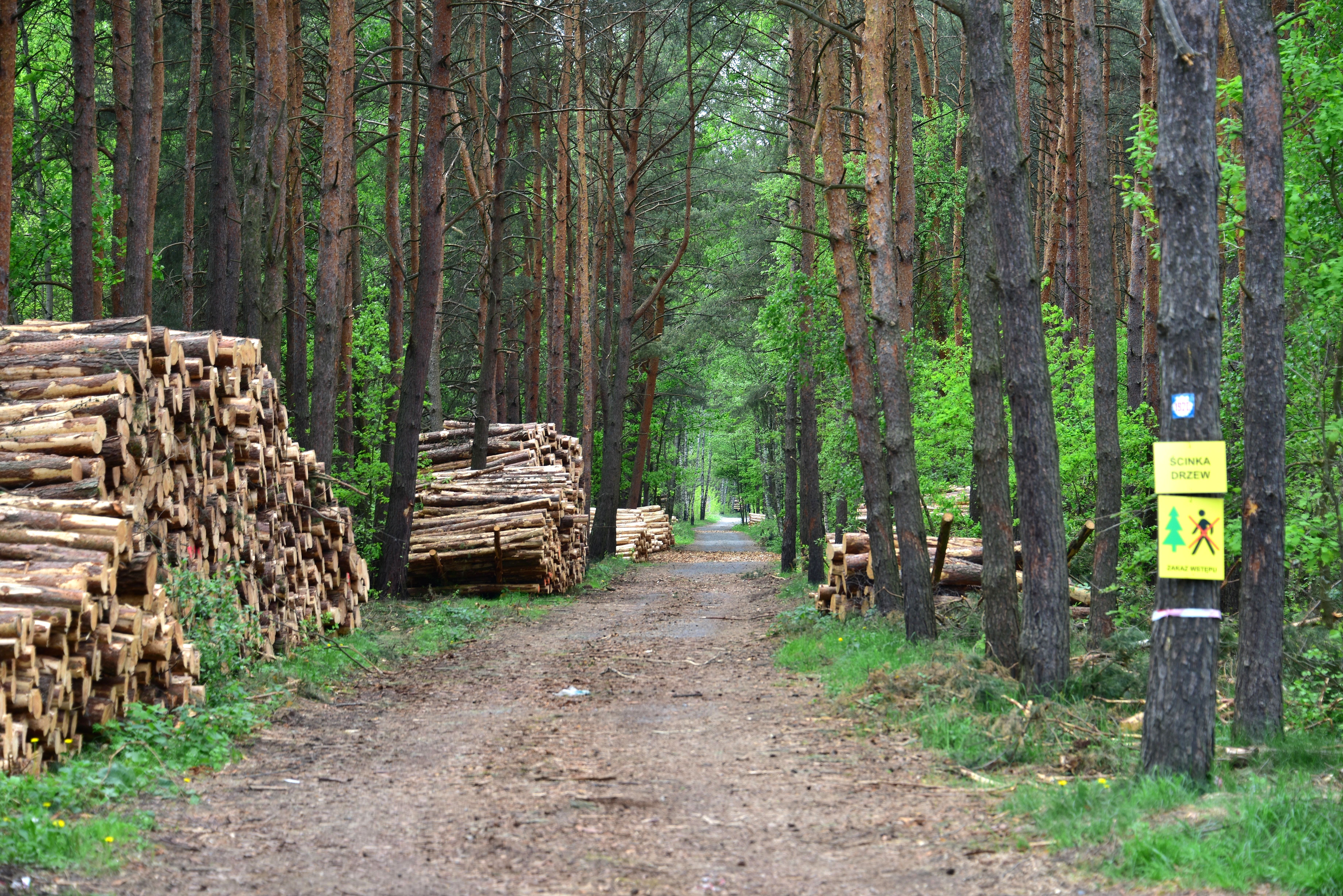 Ścinka drzew. Lasy okuniewsko-rembertowskie, okolice Ossowa. Nadleśnictwo Drewnica